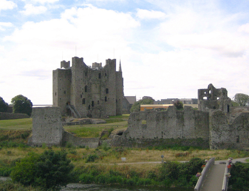 Castillo de Trim (Irlanda)